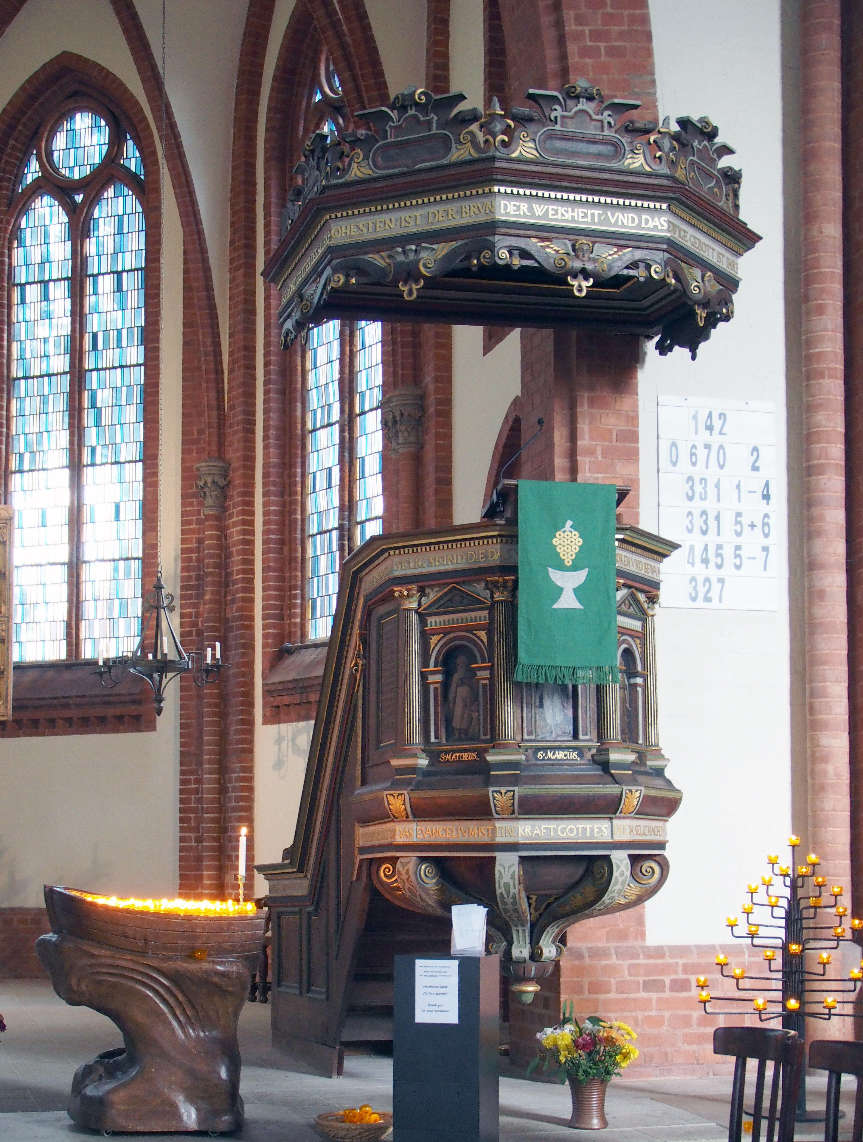 Renaissancekanzel in der Warnemünder Kirche